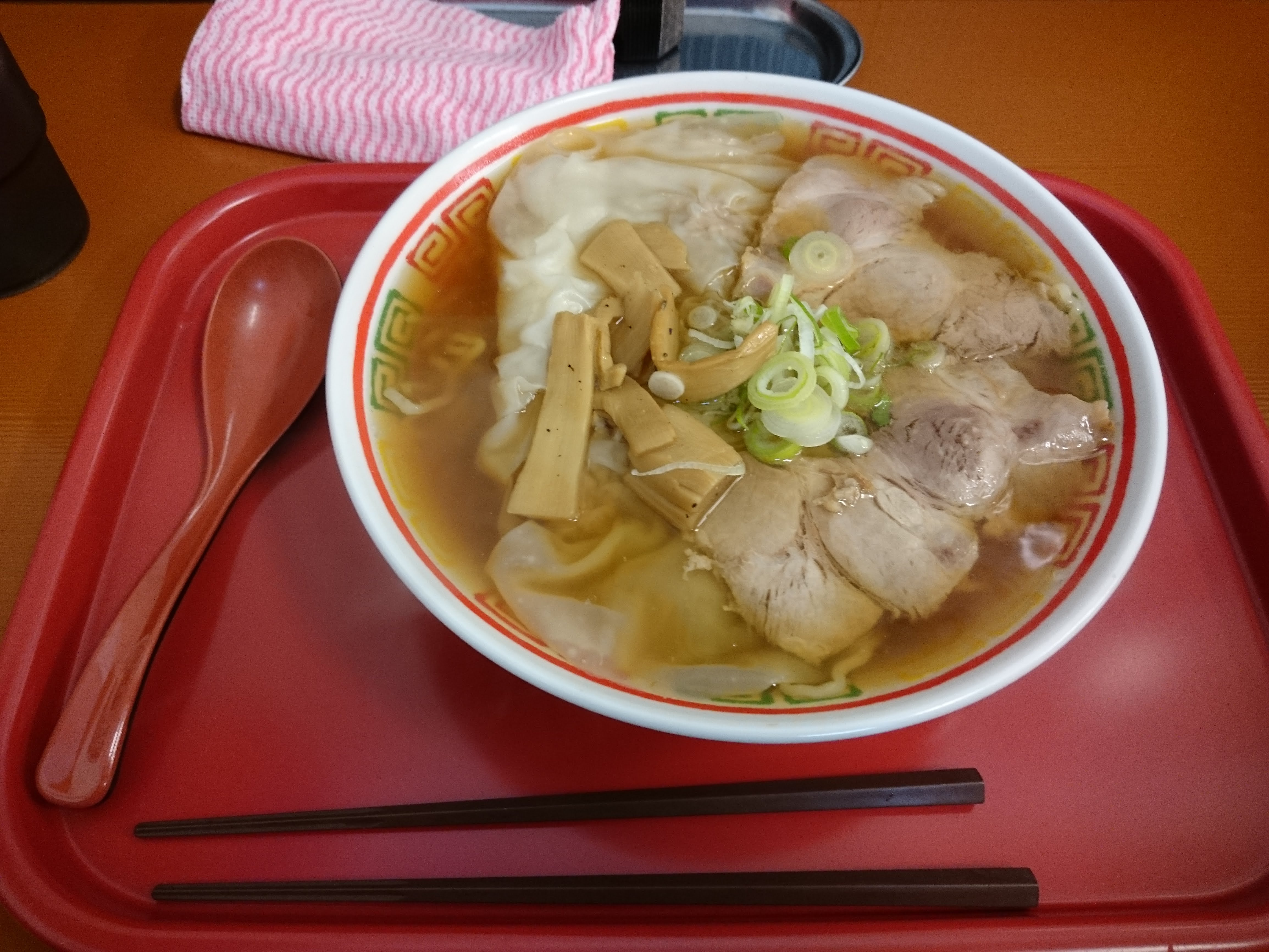 ラーメン満月酒田みなと市場店のワンタンメン